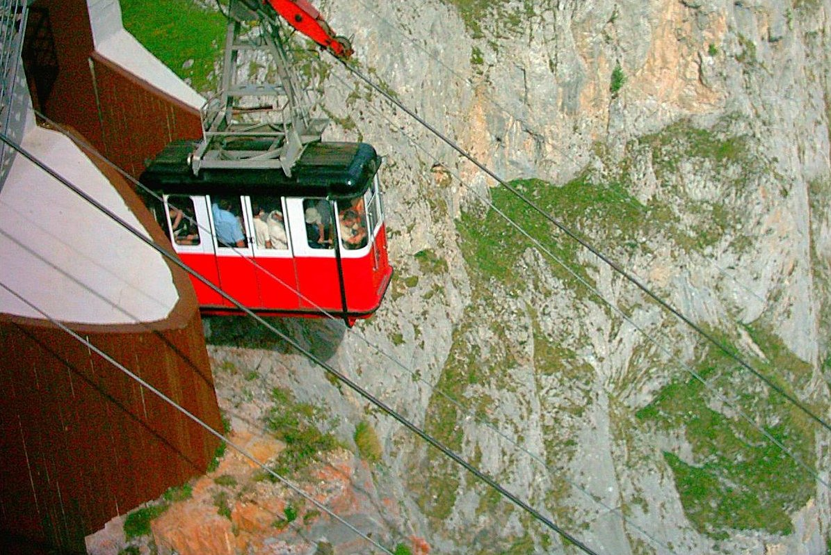 Teleférico de Fuente Dé, en Cantabria (España)